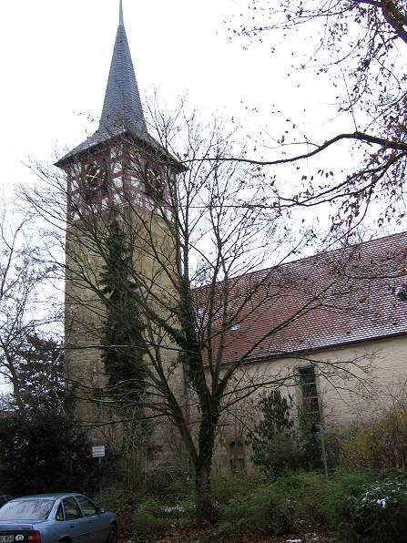 Kirche in Affalterbach, Württemberg